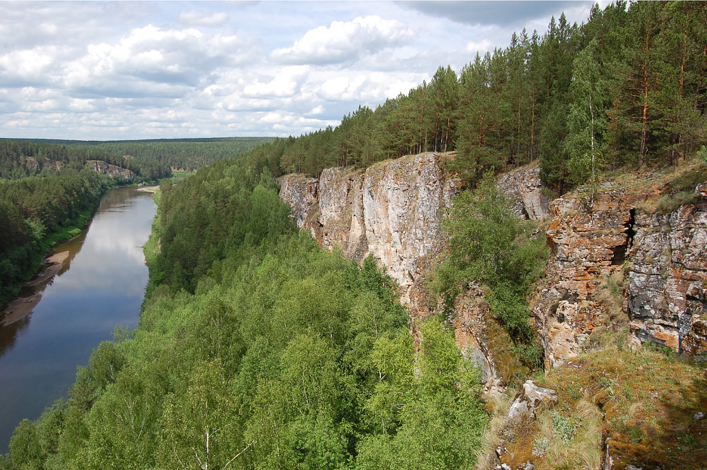 ООПТ "Участок реки Уфы между Тимофеевым и Зайкиным камнями", Челябинская область. Скала Яман-таш, река Уфа (вид вниз по течению), вдали слева - скалы Лось и Камень-копна.